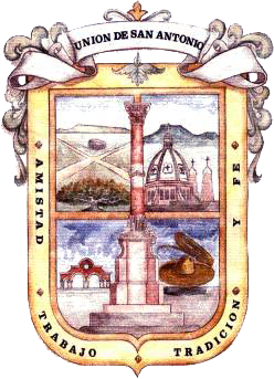 escudo de armas de union de san antonio